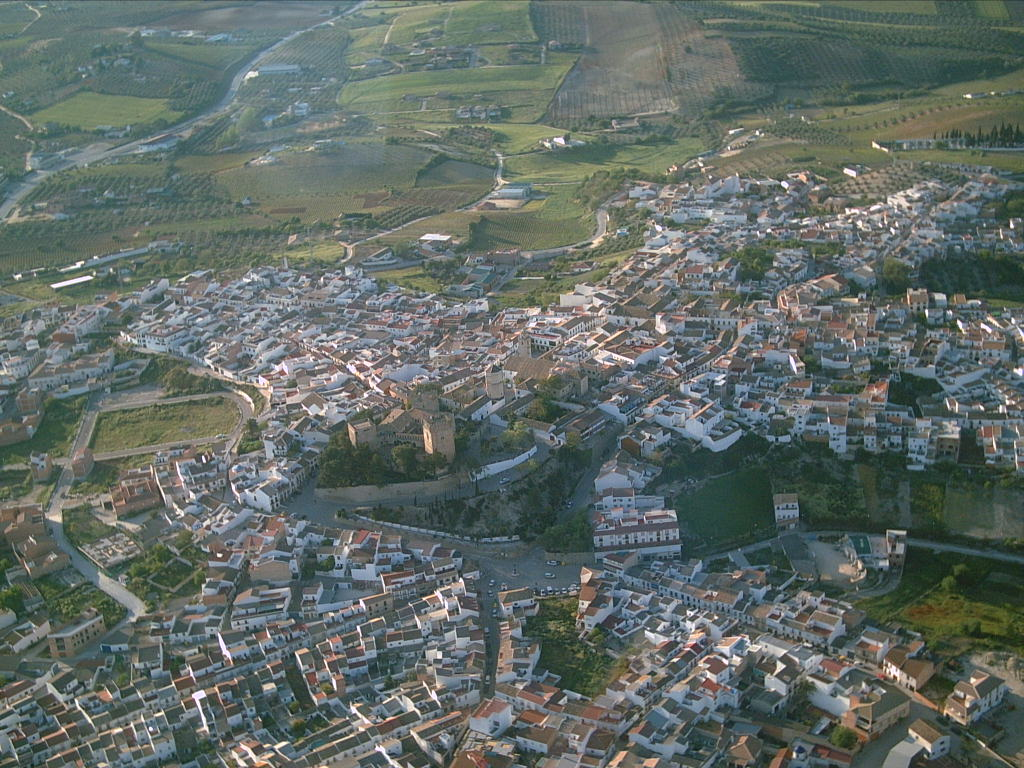 Fotografía aérea de la localidad de Montemayor (Córdoba, España)